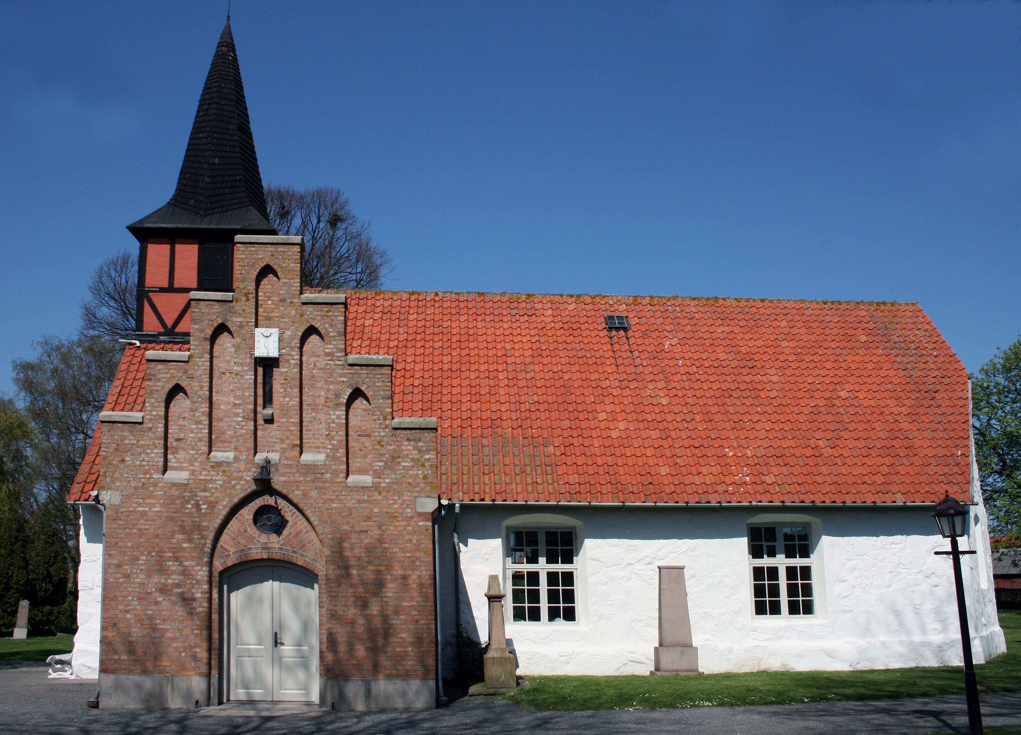 Hasle kirke fra syd